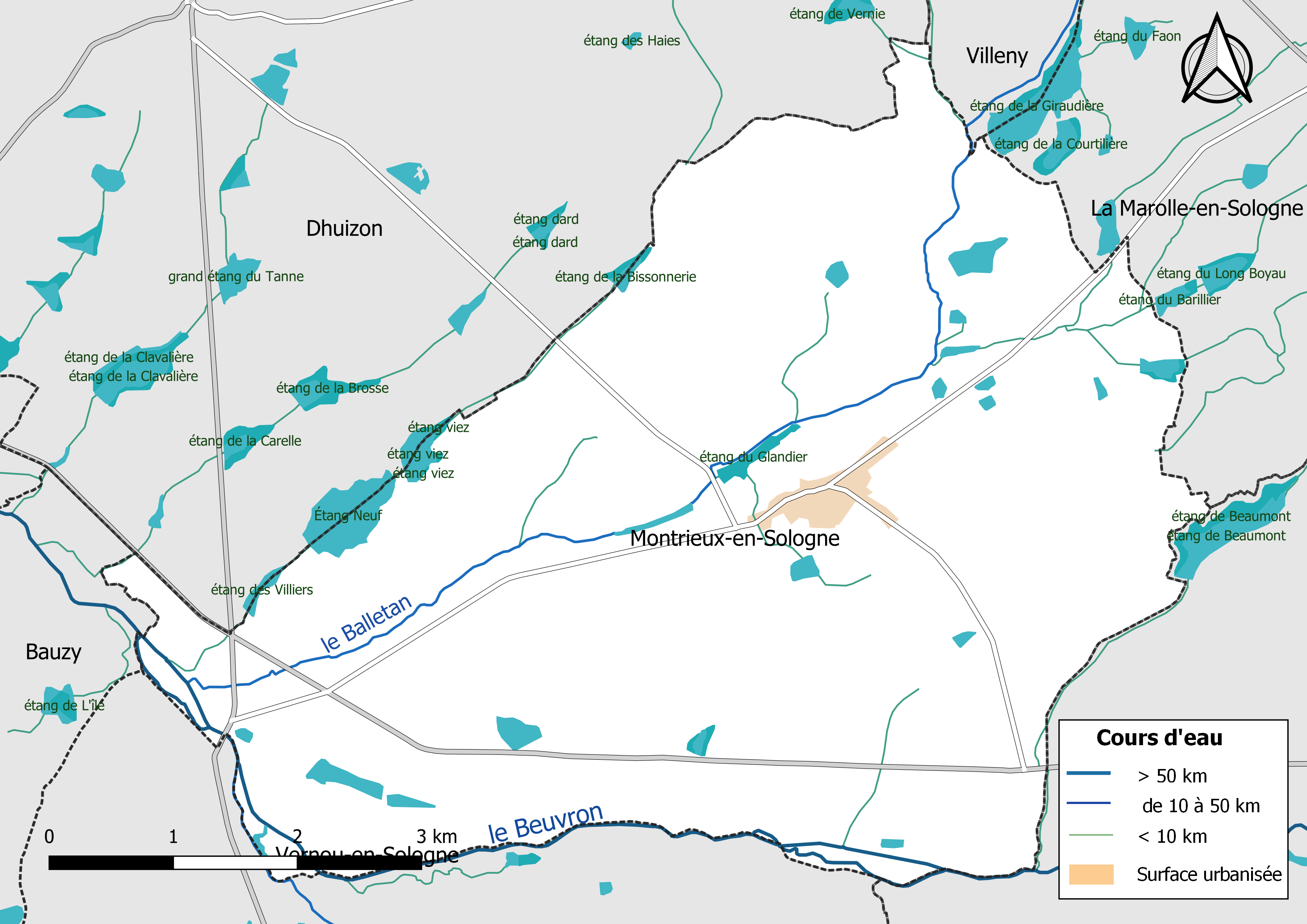 Carte du réseau hydrographique de la commune de Montrieux-en-Sologne (Loir-et-Cher, France).